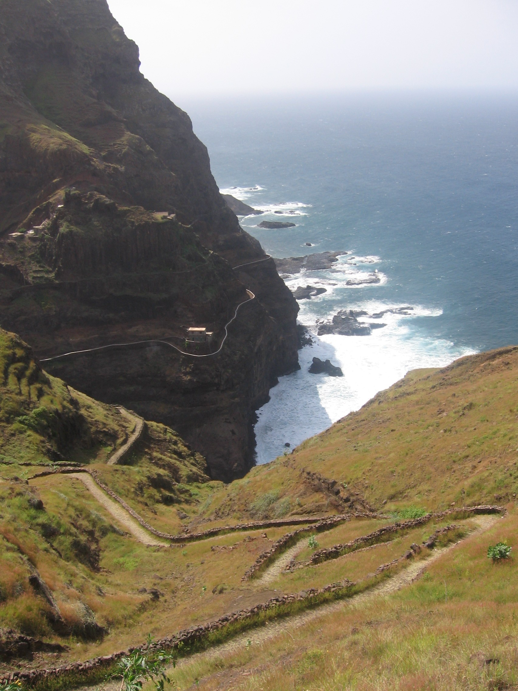 Caminho litoral, Corvo, Ribeira Grande, Santo Antão, Cabo Verde